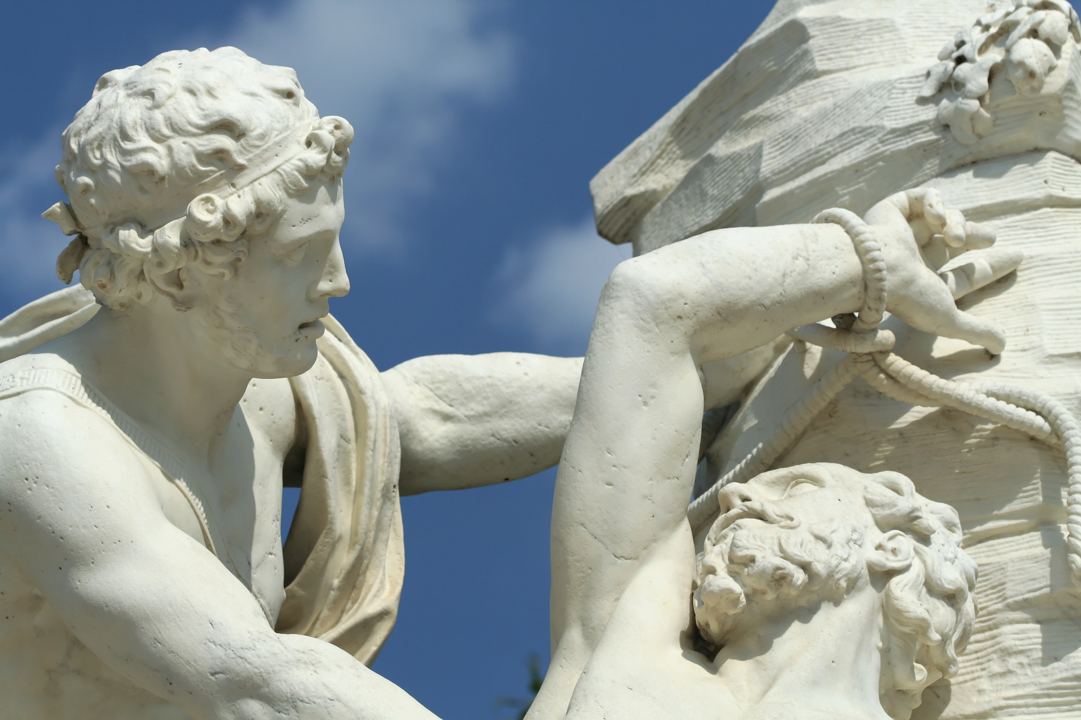 Aristée attachant le dieu marin Protée à un rocher pour le forcer à lui dévoiler son avenir.